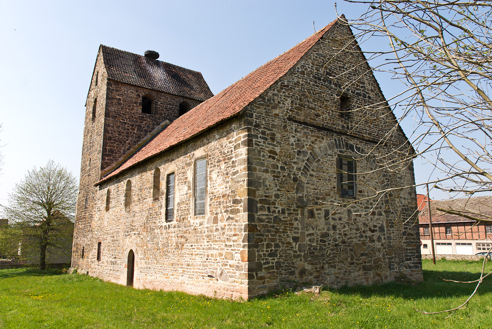 Kirche St. Nicolai zu Schwanefeld